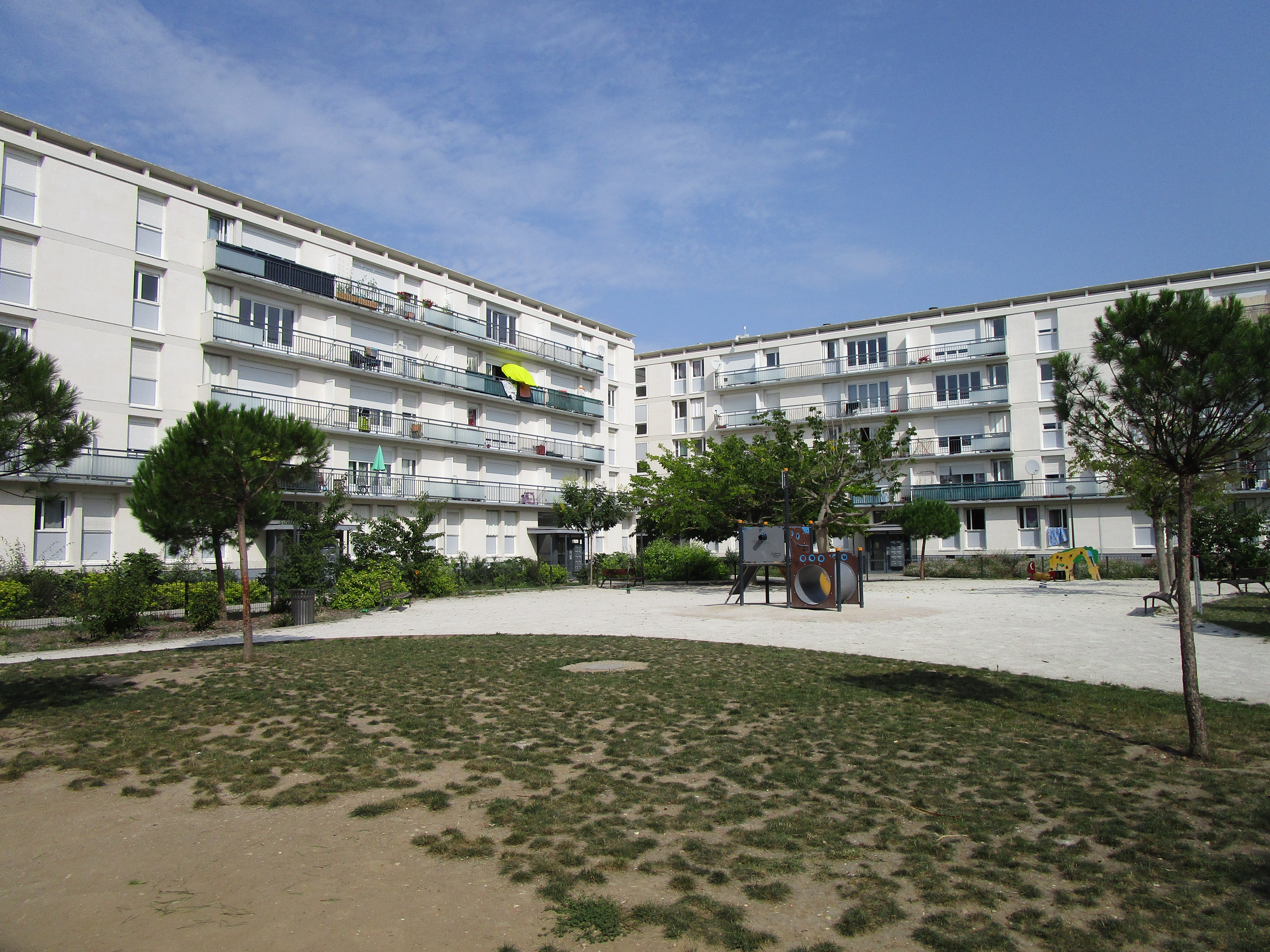 La place Montgolfier au sein de la cité Maryse-Bastié, dans le quartier Giraudeau de Tours. Construit en 1961.